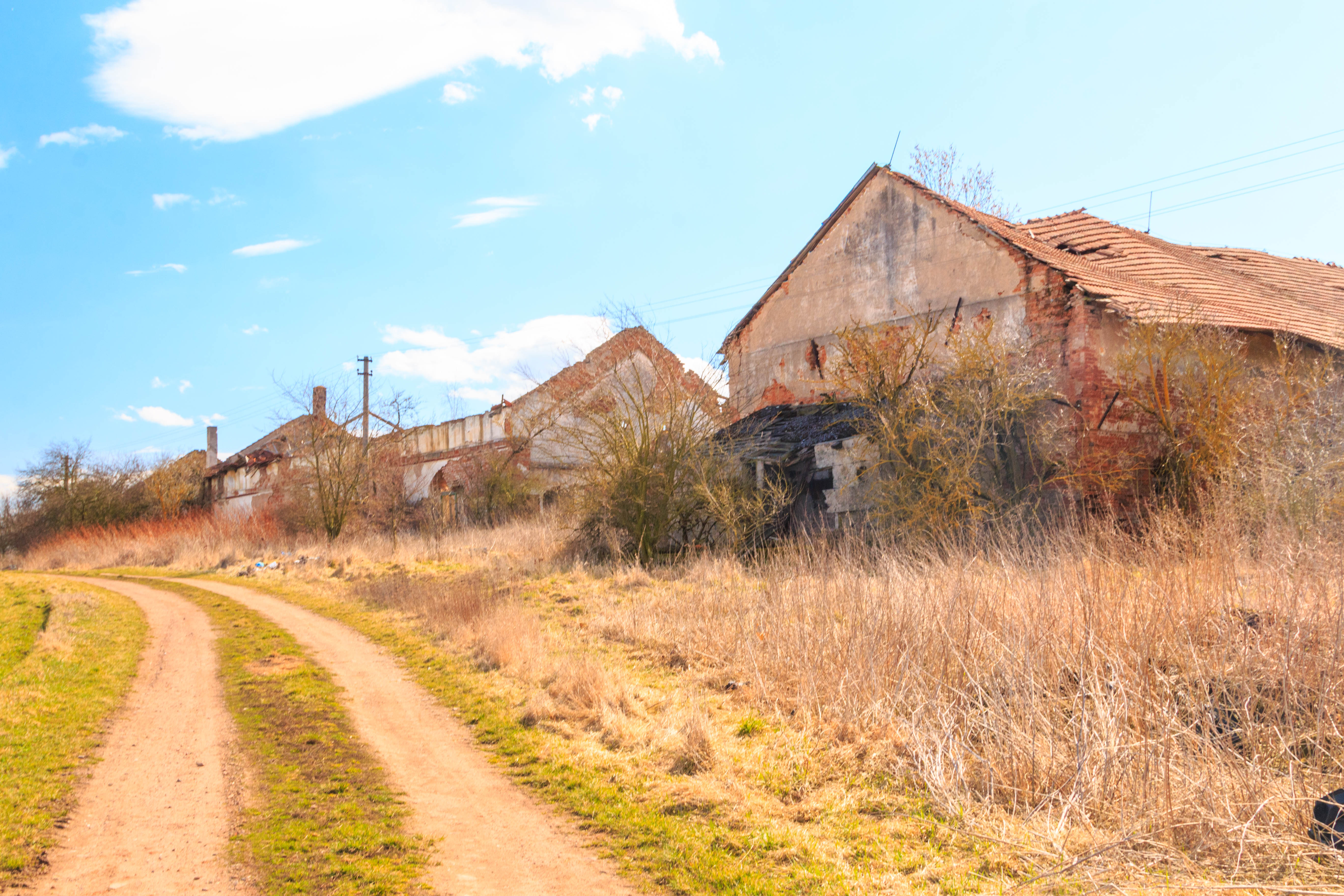 Ruiny dvora Oktaviánov Project: Vodstvo.